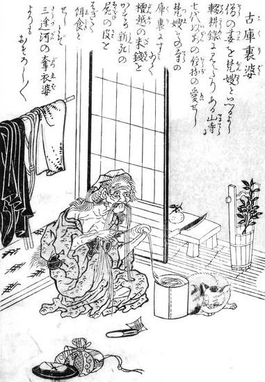 Kokuribaba (古庫裏婆) from the Konjaku Hyakki Shūi (今昔百鬼拾遺)